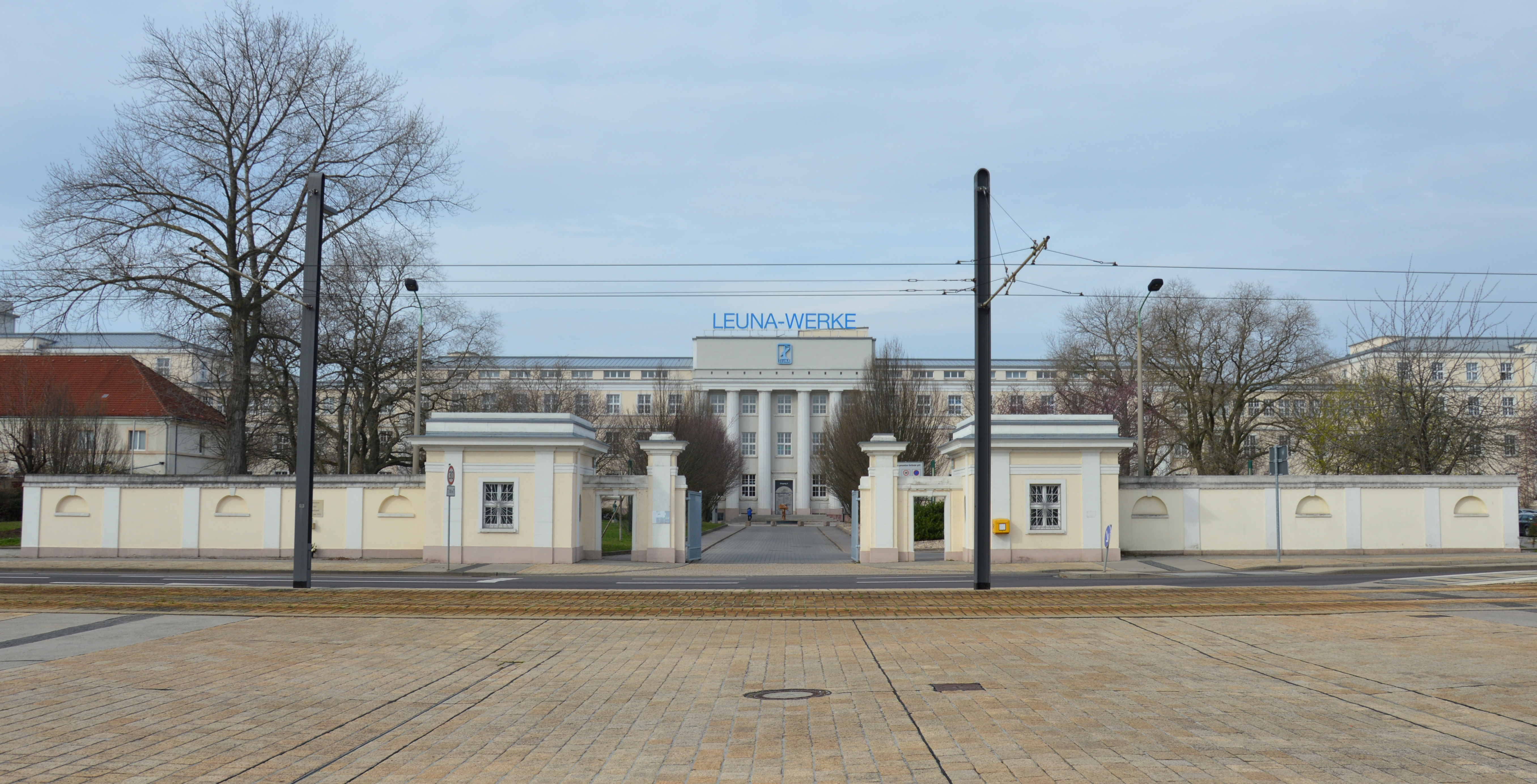 Eingang Leuna-Werke